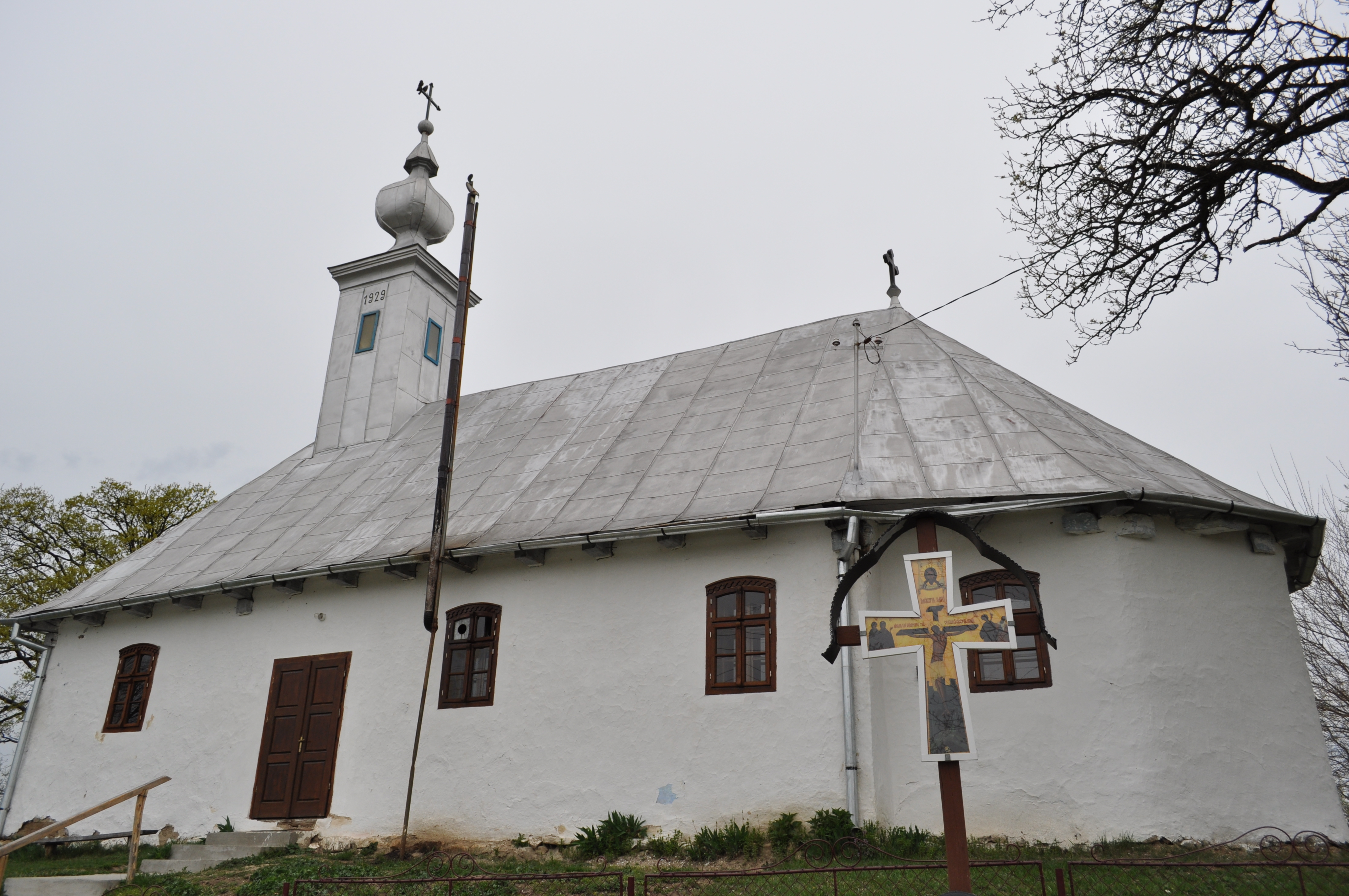 Biserica de lemn "Cuvioasa Paraschiva", sat DOBREŞTI; comuna BARA